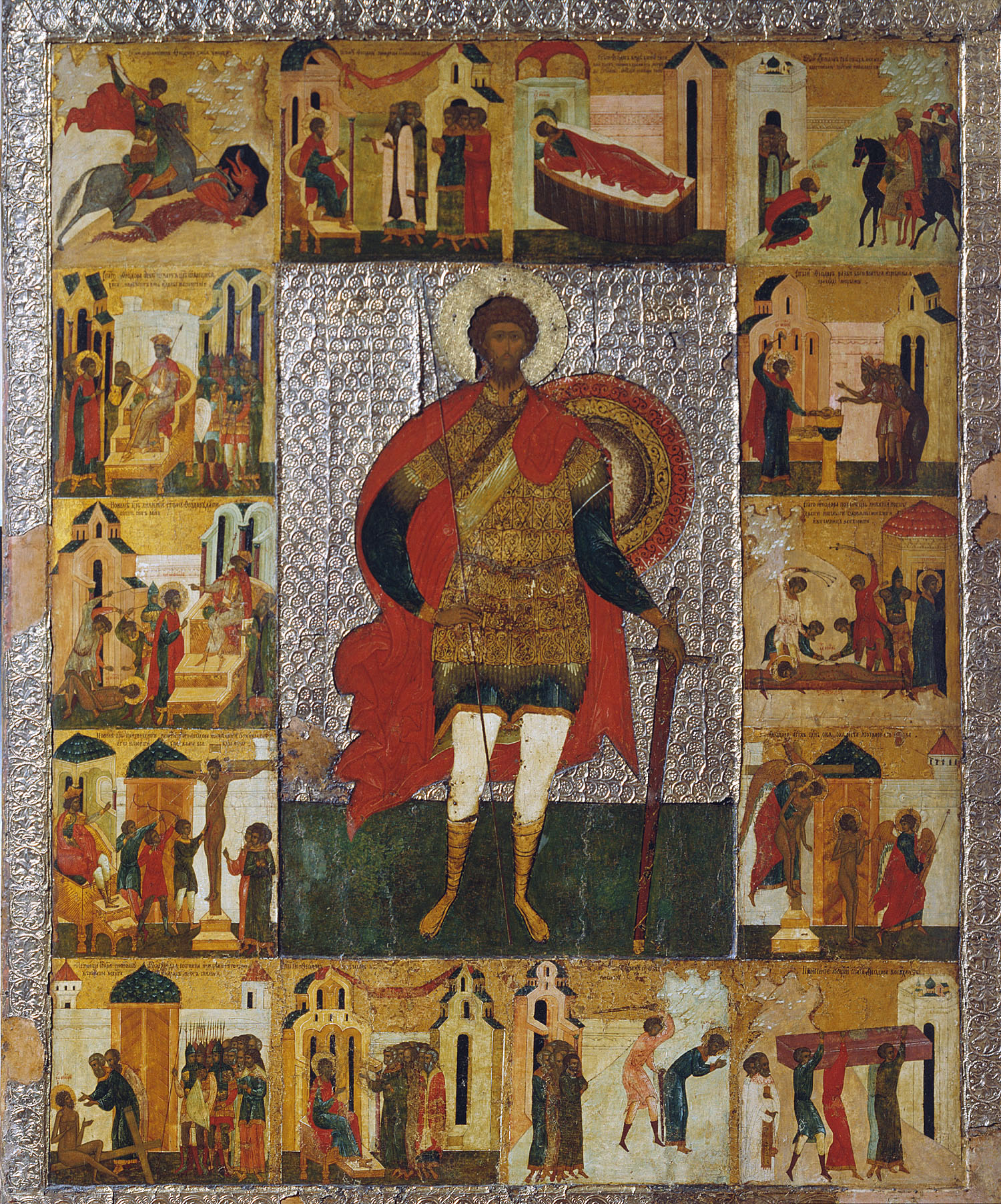 Феодор Стратилат с житием. Икона происходит из церкви Феодора Стратилата на Ручье в Новгороде. Хранится в собрании Новгородского государственного историко-архитектурного и художест­венного музея-заповедника, Новгород, Россия